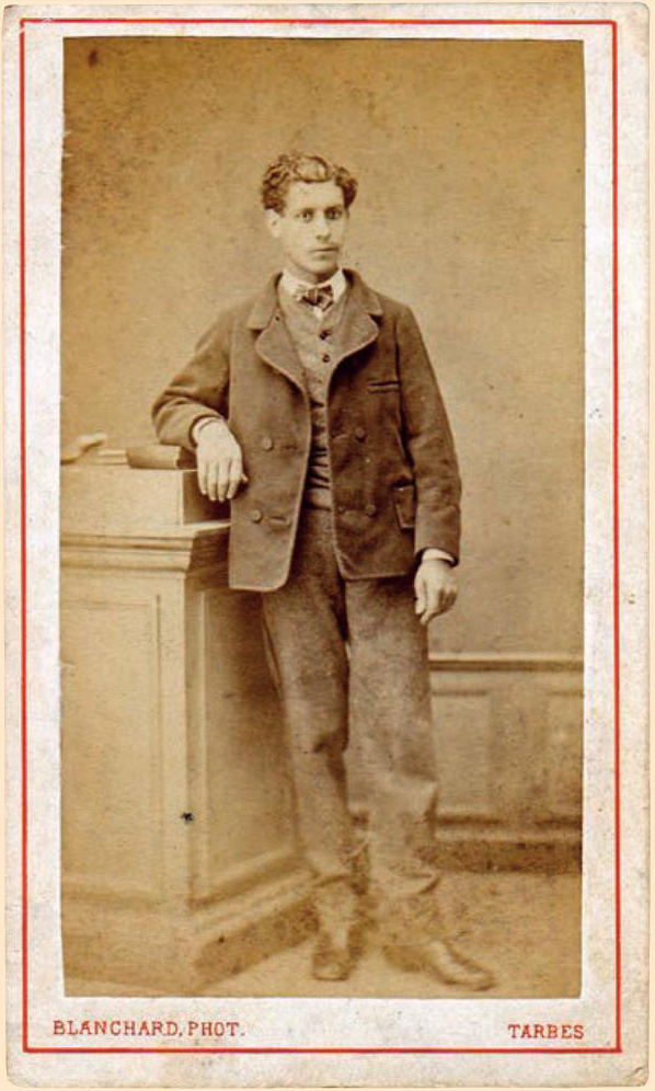 Photo-carte de visite représentant peut-être Isidore Ducasse (1847-1870), portrait exécuté à Tarbes en 1867 par le studio Blanchard, place Maubourguet. Ce document a été retrouvé par Jean-Jacques Lefrère à Bagnères-de-Bigorre en 1977 chez des descendants de la famille de Georges Dazet (1852-1920), fils de Jean Dazet, le tuteur de Ducasse. Il a été publié une première fois chez l'éditeur Pierre Horay en noir et blanc. Ce document, unique, a été vendu par l'étude Alde (Paris) le 20 octobre 2009, avec une estimation de 40/50 000 euros, et reproduit par scanner dans le catalogue de vente publique disponible en ligne en format PDF.